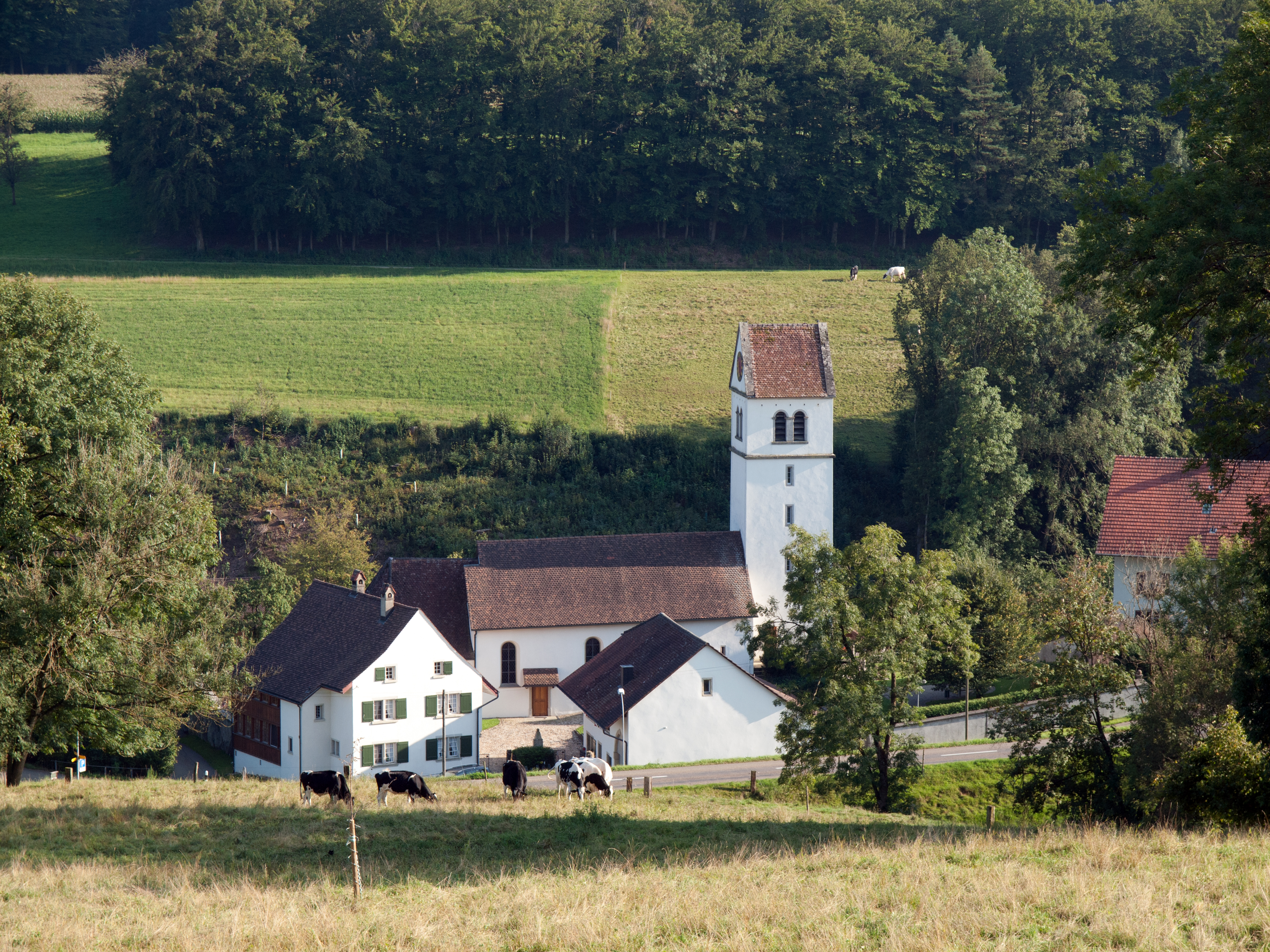 Der Kern der Siedlung Kirchbözberg (Gemeinde Unterbözberg, ab 2013 Gemeinde Bözberg). Von welchem die reformierte Kirche mit Pfarrhof und Pfarrhaus, als Baugruppe als regional schützenswert deklariert ist (B-Objekt).